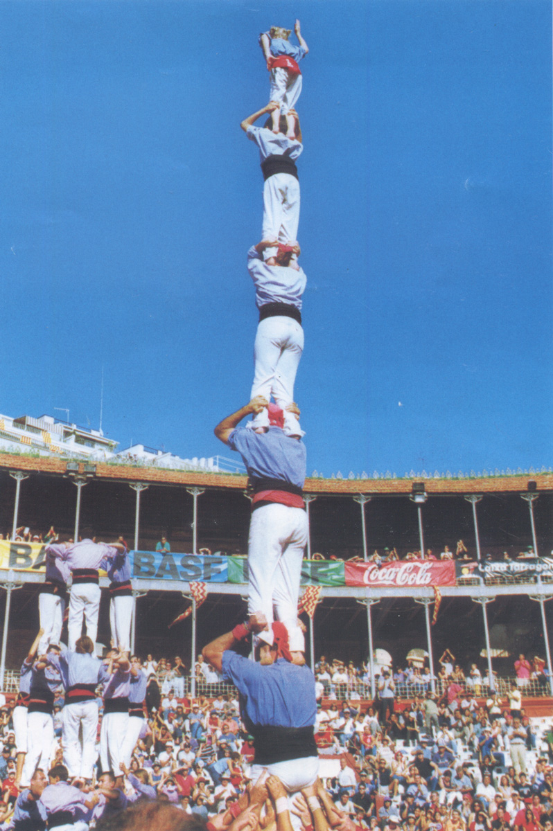 Primer pilar de 6 carregat dels Marrecs de Salt, carregat el 6 d'octubre de 2002 al Concurs de castells de Tarragona